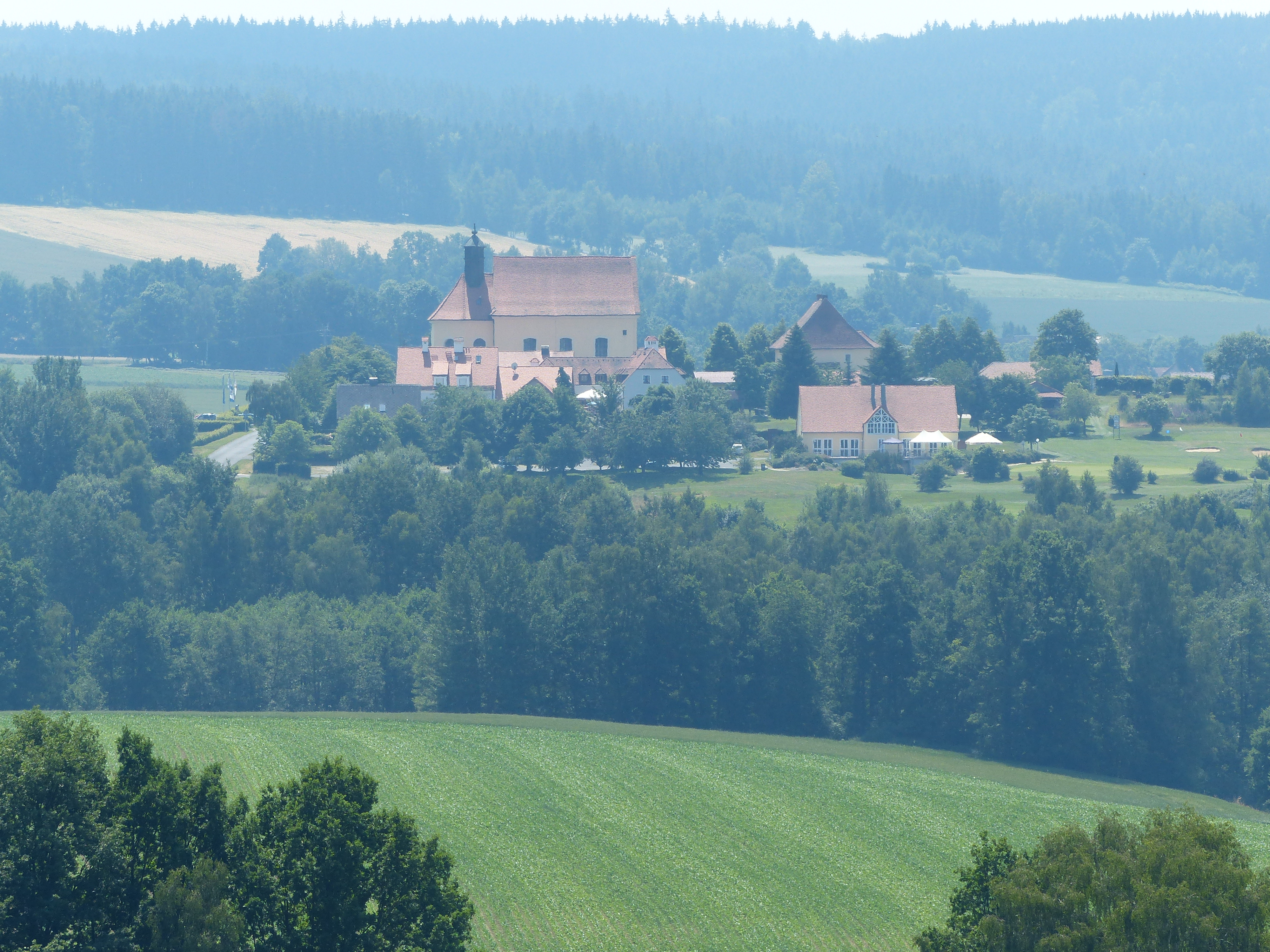 Kleine Kappl aus Richtung Kurallee